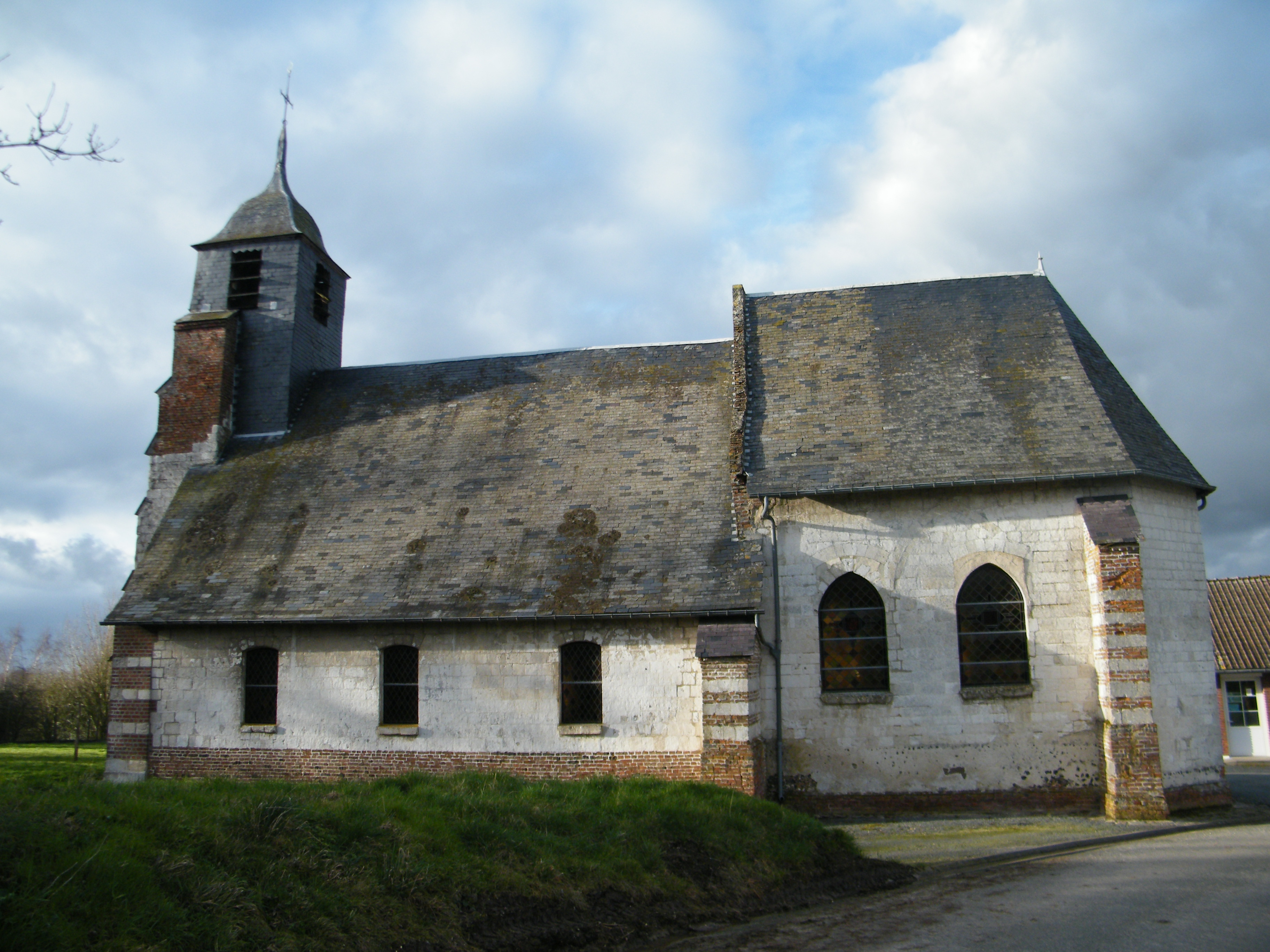 Coulonvillers, Somme, France, église côté sud.